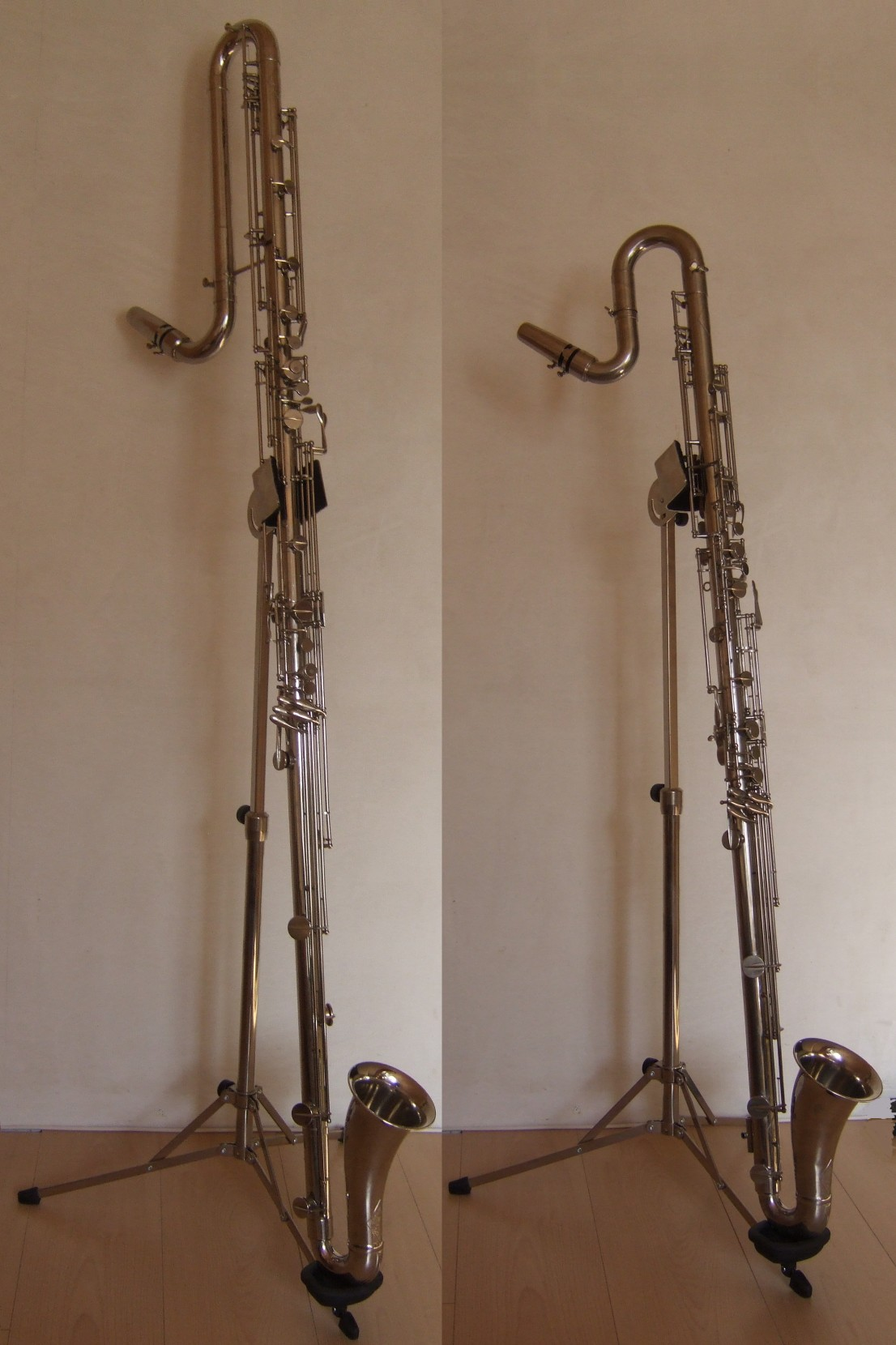 Clarinette Contrebasse en Bb et Clarinette Contralto en Eb, toutes deux, métal.